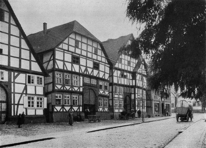 Originalbeschreibung „Straße in Beverungen“. – Nordrhein-Westfalen, Deutschland.